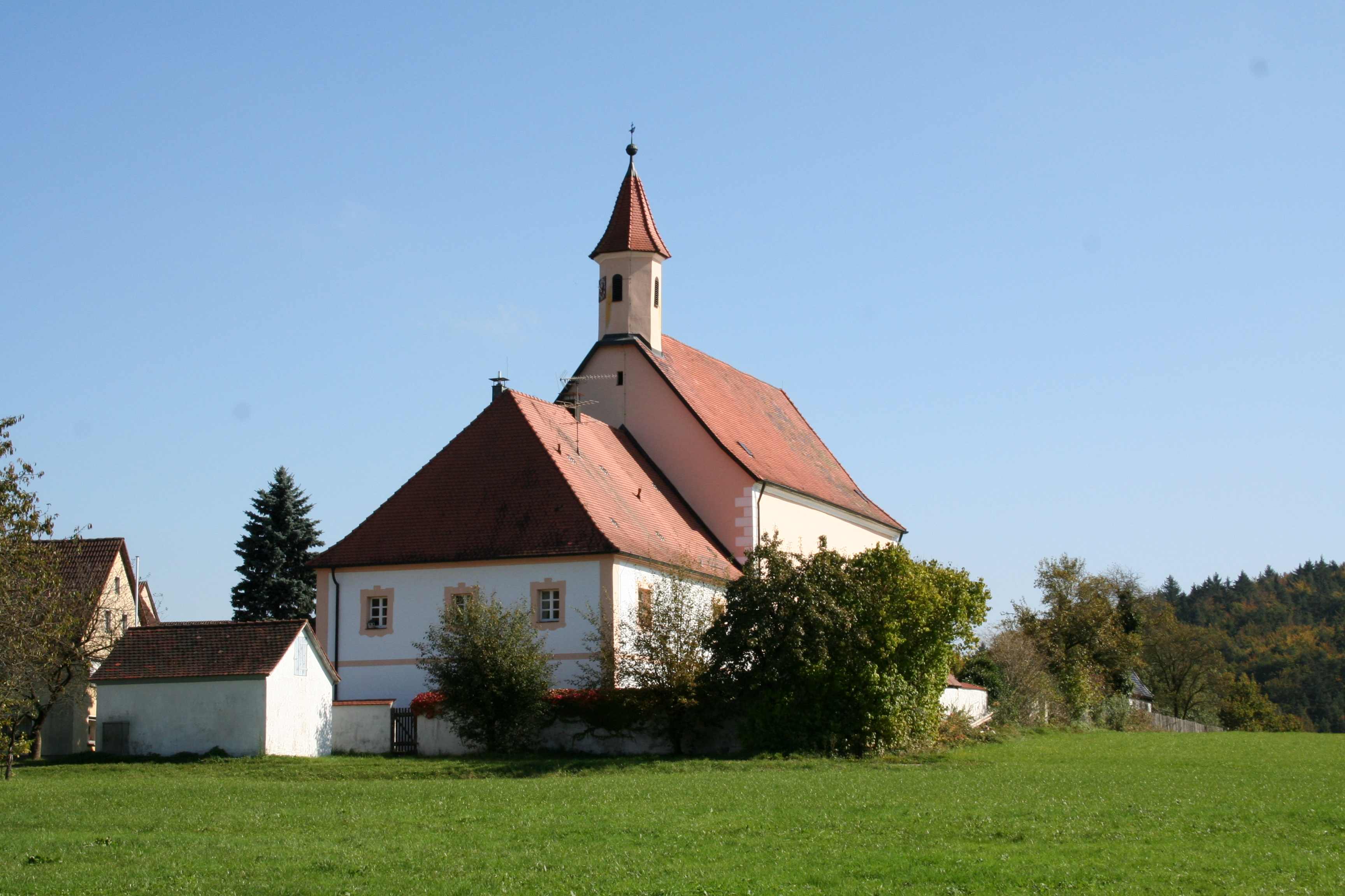 Kirche Mariae Himmelfahrt (Heldmannsberg)